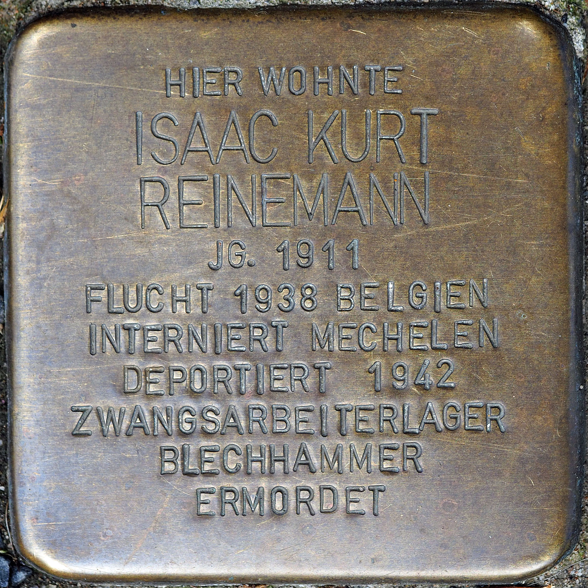 Stolpersteine MG: Heymann, Isaac Kurt